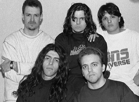 групса Сателит